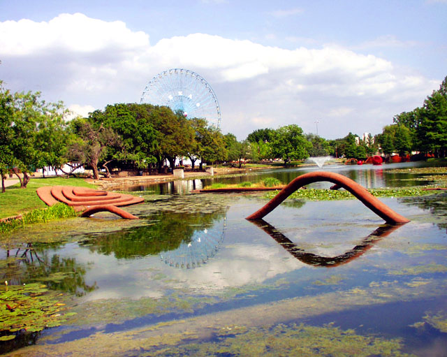 Dallas 2000